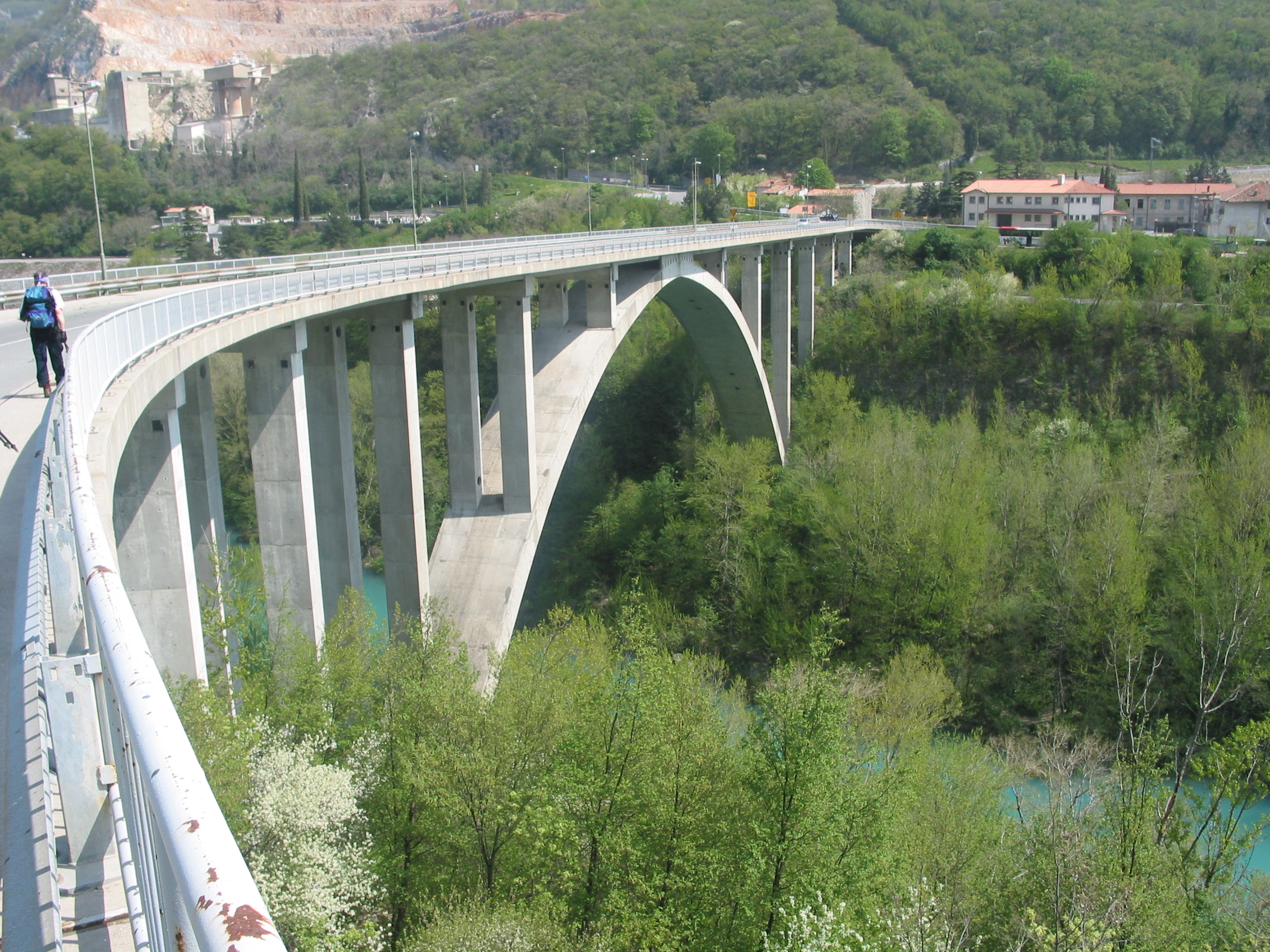 Sabotinski cestni most čez Sočo v Solkanu.